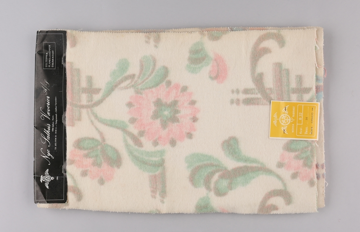 Stoffprøver fra Salhus Væverier, Norge (NTMT.02957, Norsk Trikotasjemuseum).